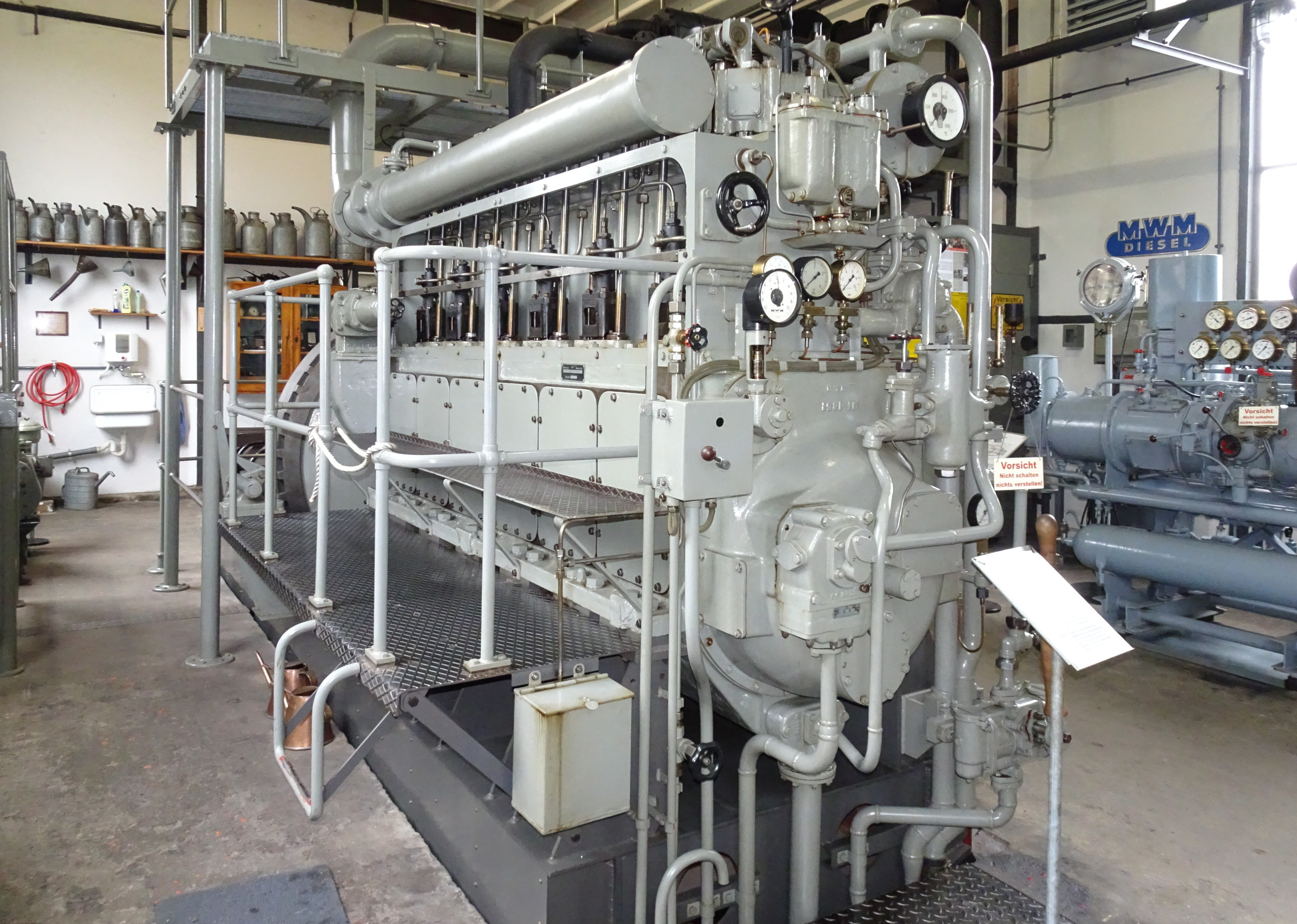 Maschinenmuseum Kiel-Wik, U-Bootdiesel der Motorenwerke Mannheim von 1944